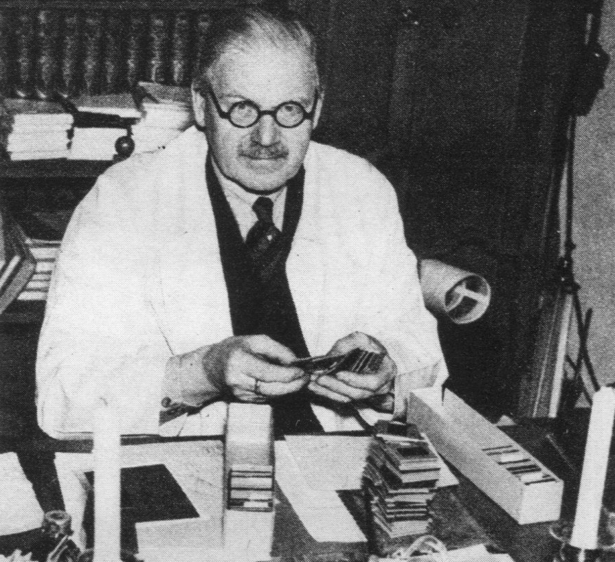 fotograf Gustaf Wernersson Cronquist